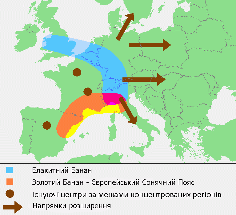 Blaue und Goldene Banane, Abwandlung von Bild:Blaue-banane.png